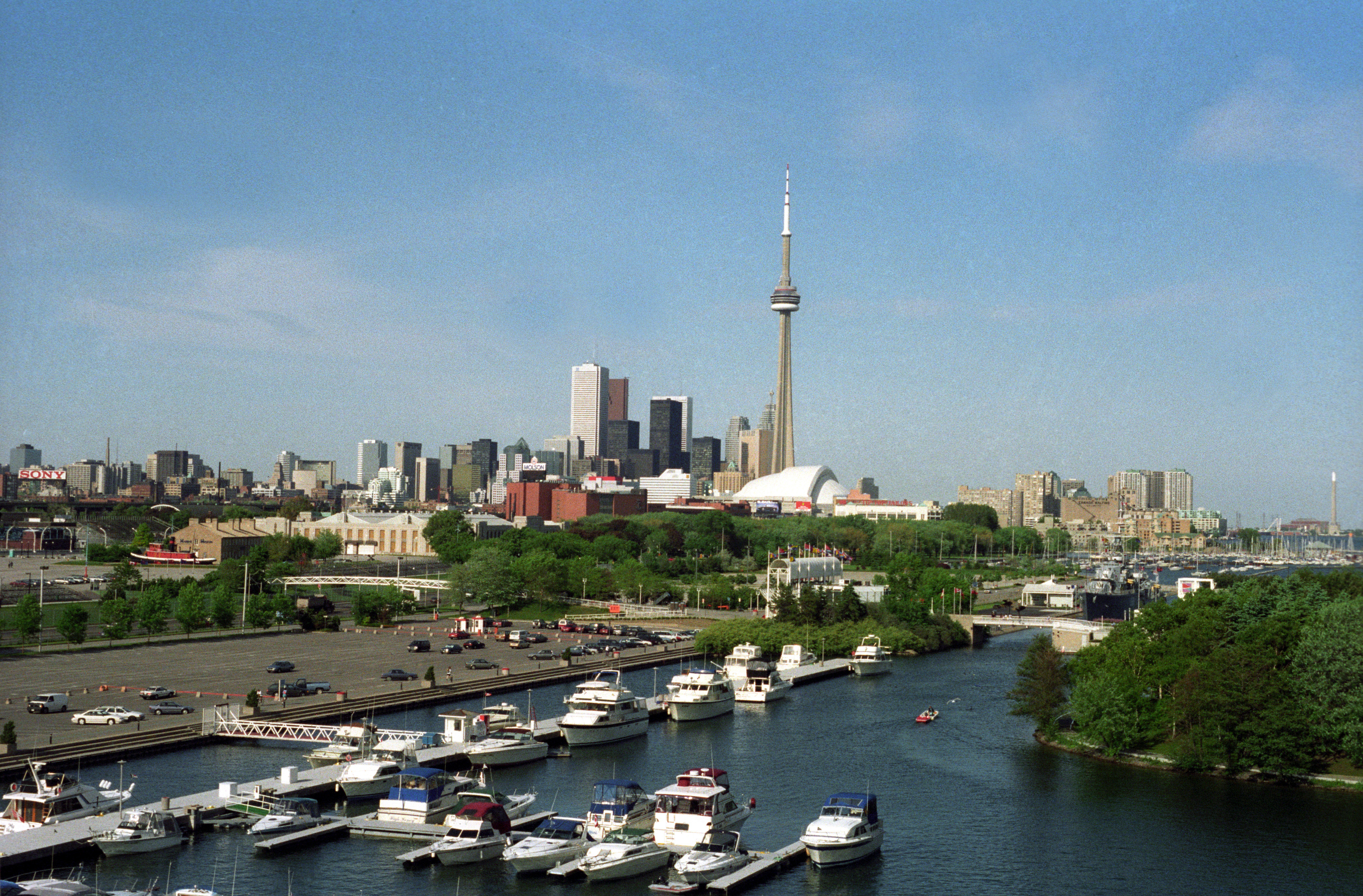 Toronto in 1992.